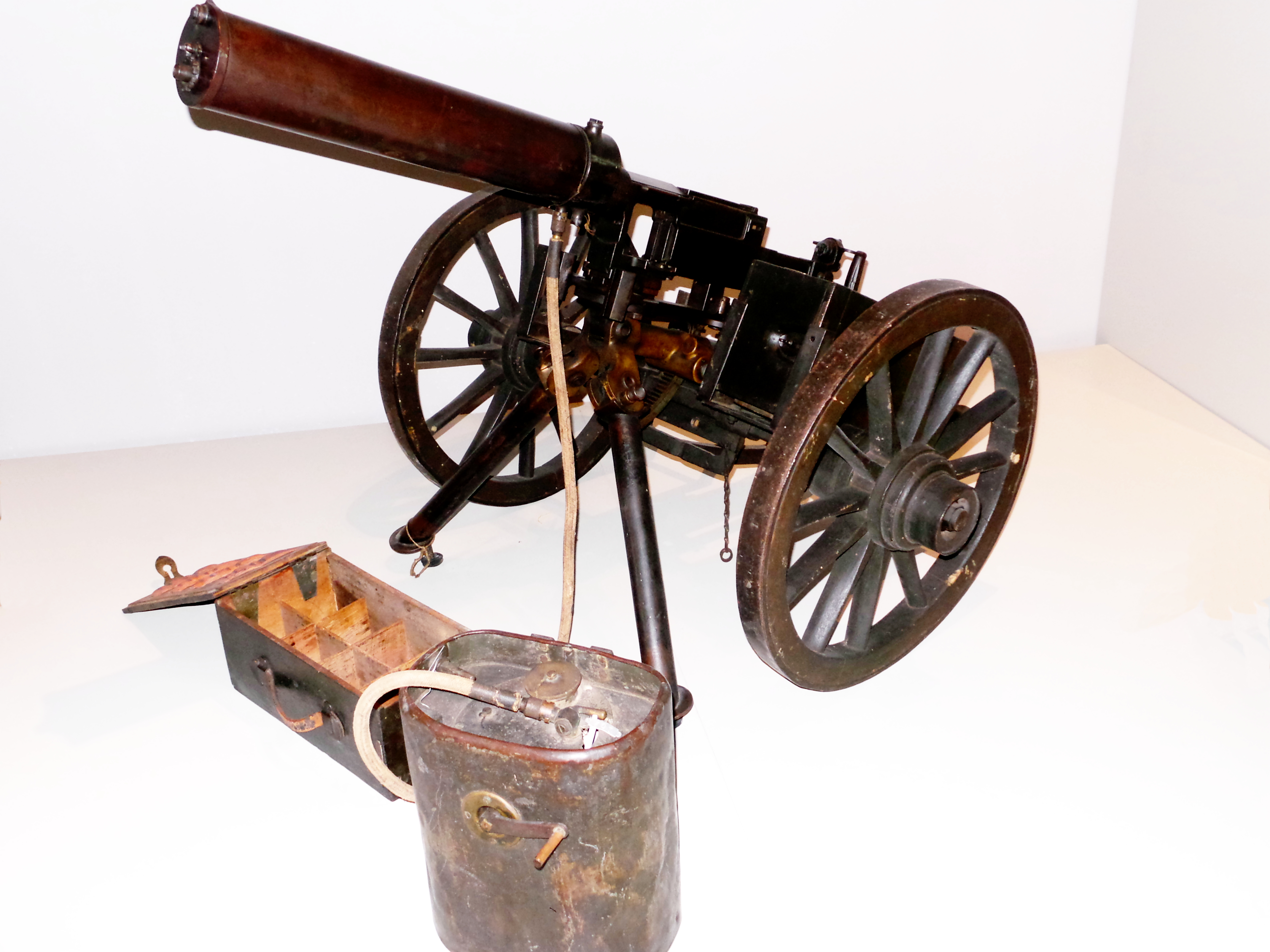 Schweres italienisches Maschinengewehr Fiat Revelli mod. 914, Kaliber 6,5 mm auf Rädern, mit Munitionskasten und Kühlmittelbehälter